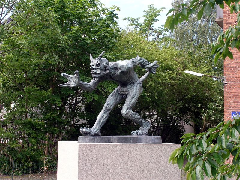 Jesuskirken i Danmark. En trold, der lugter kristent blod